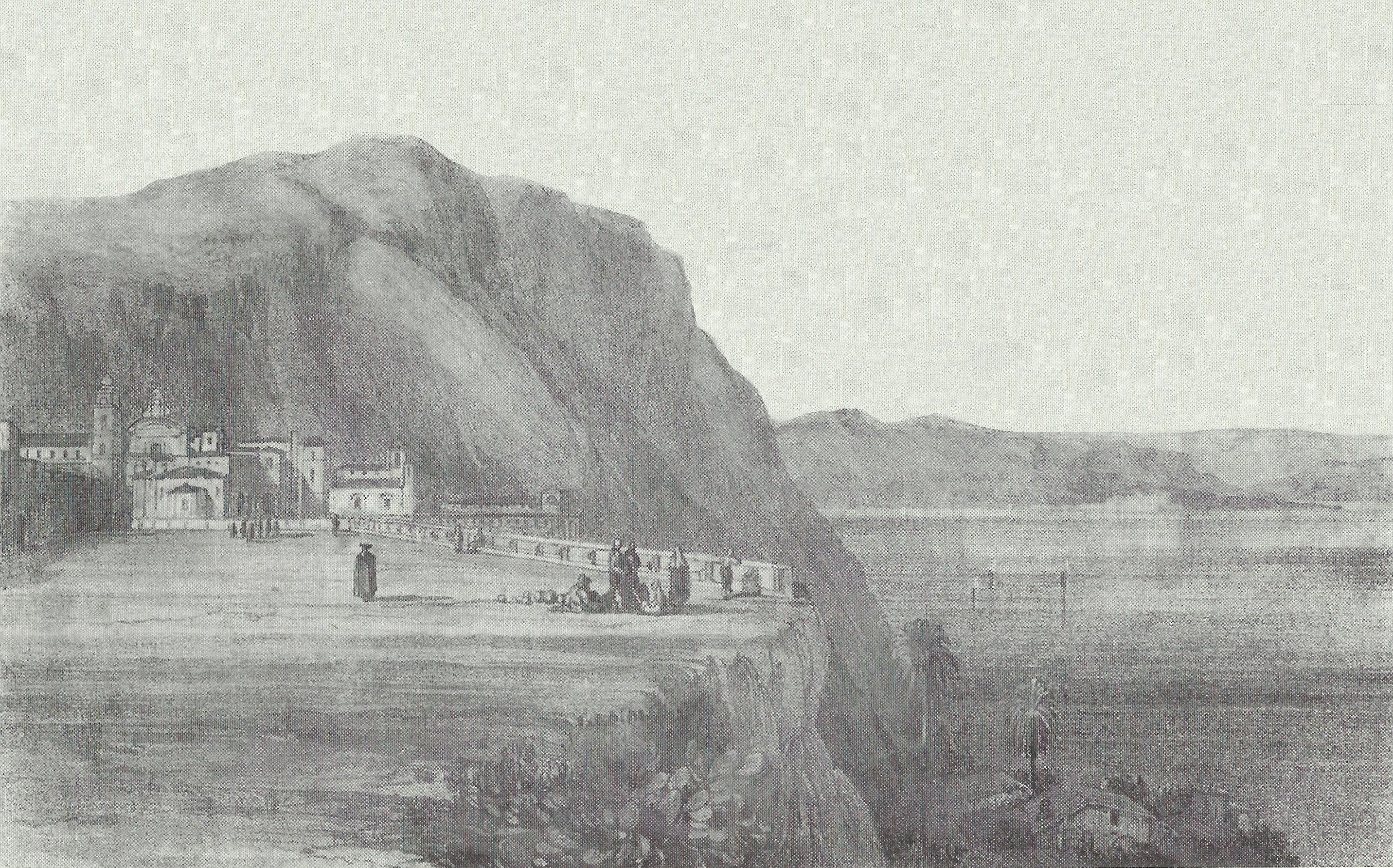 Piano delle Muraglie di Palmi (odierna Villa comunale Giuseppe Mazzioni) nel XIX secolo.